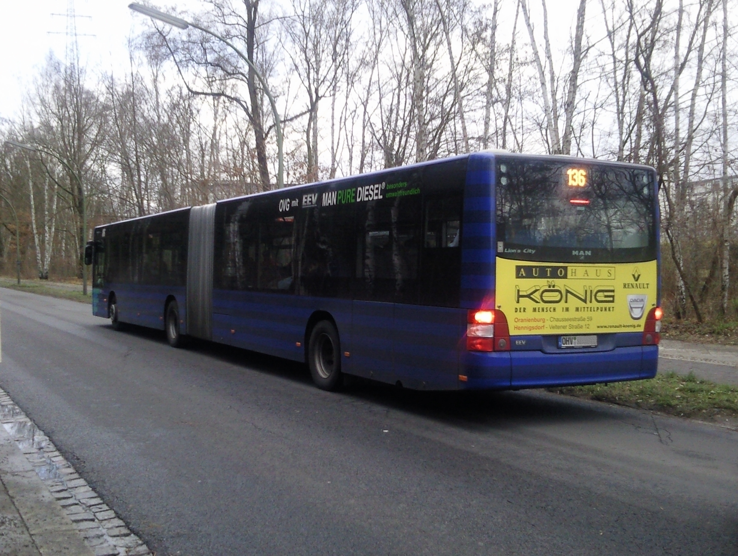 Ein Bus der OVG fährt am Alemannufer in Spandau-Hakenfelde auf der Linie 136.